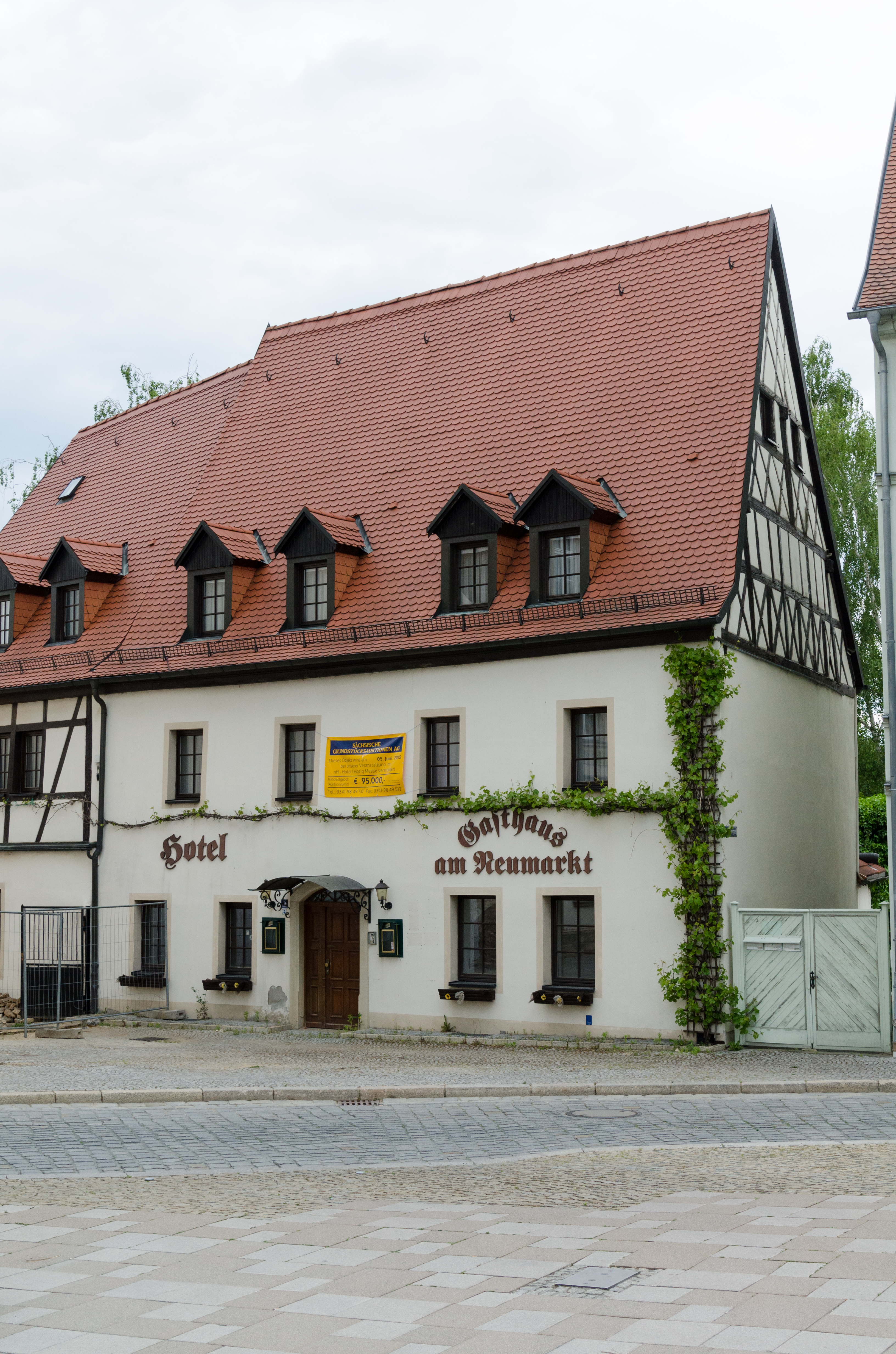 Zeitz, Neumarkt 15